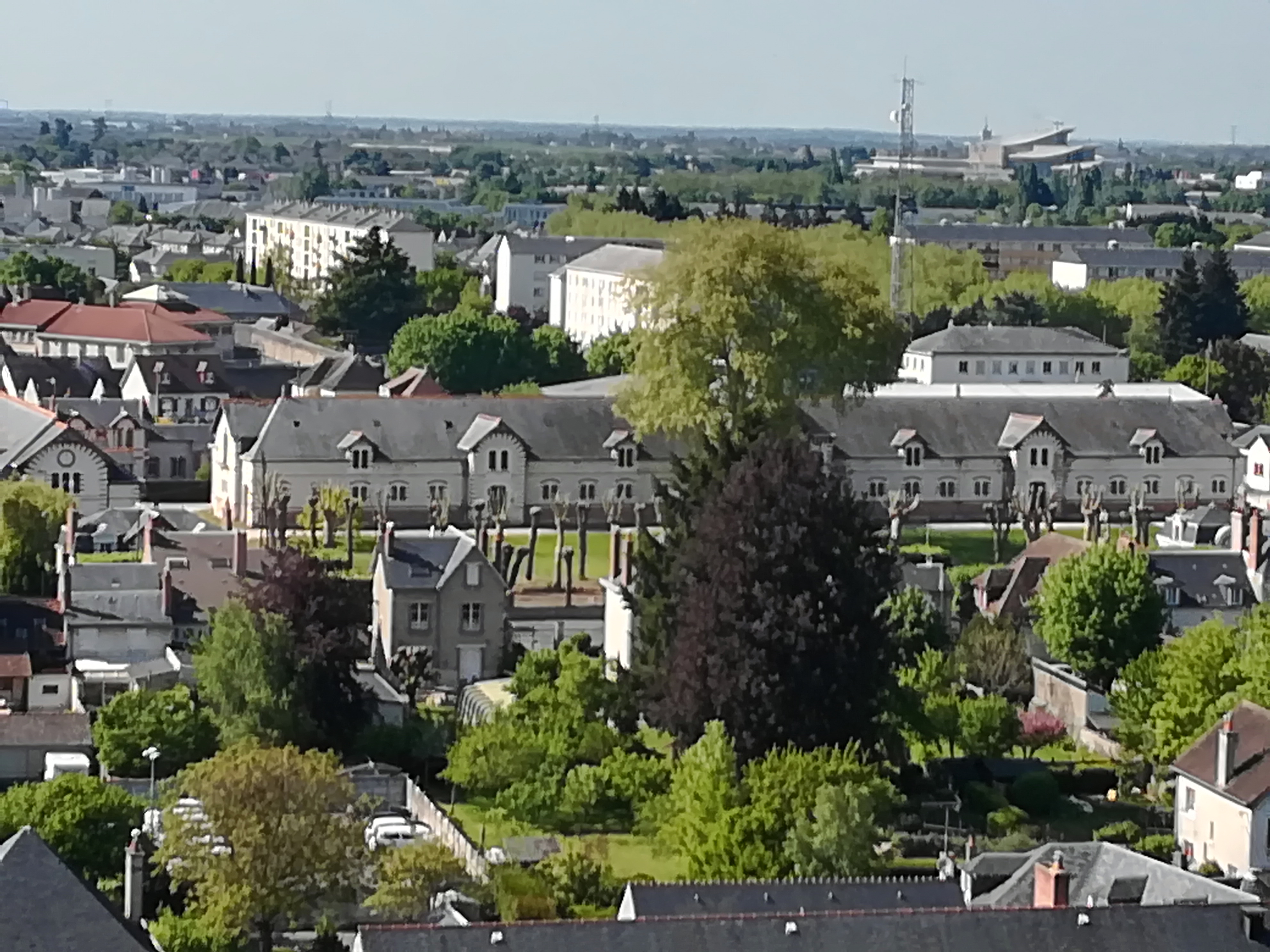 Haras national de Blois vu depuis la basilique